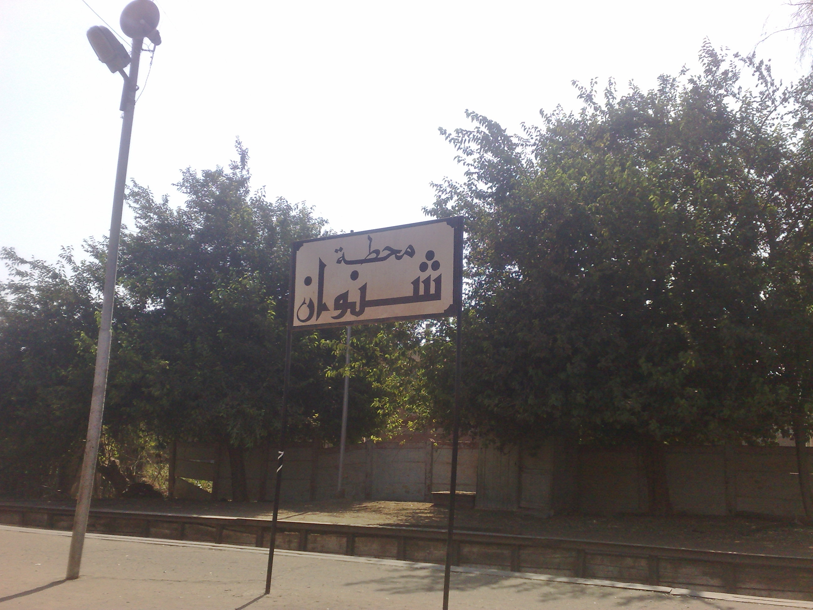 محطة قطارات شنوان، شبين الكوم